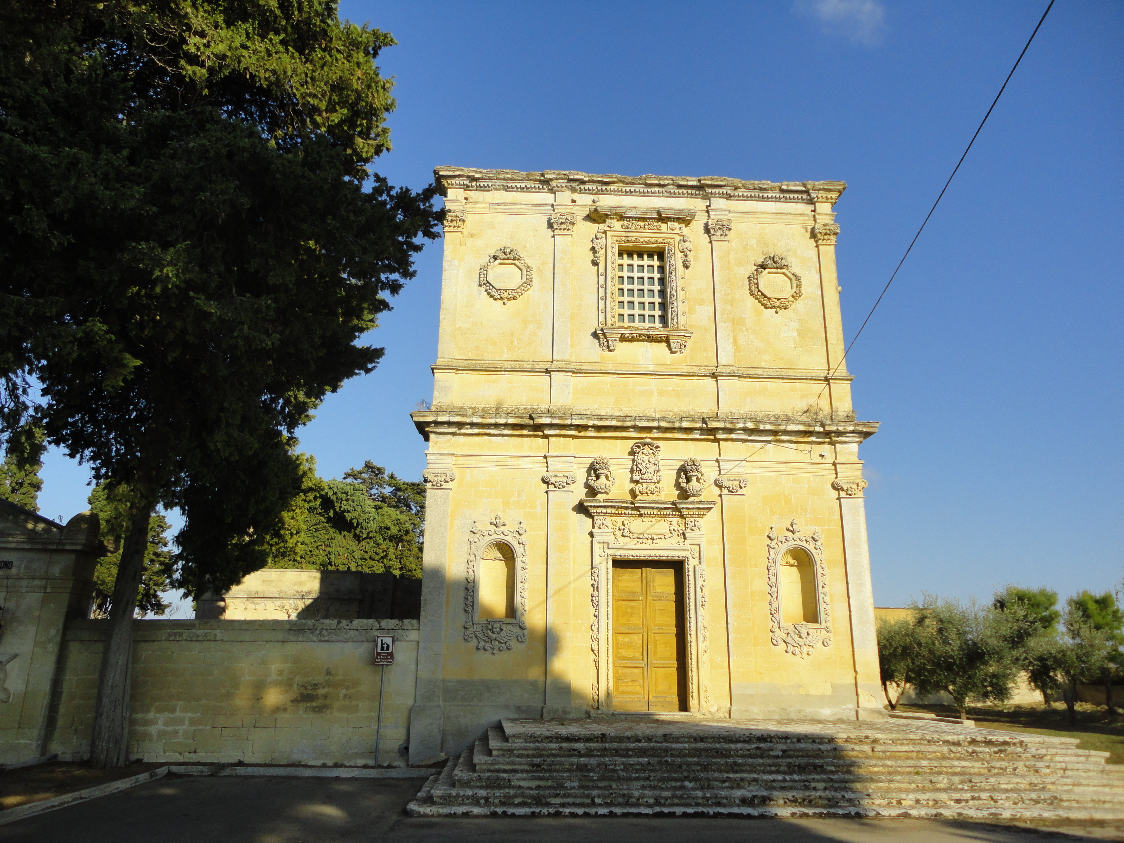 Chiesa della Madonna Incoronata Vernole, Lecce